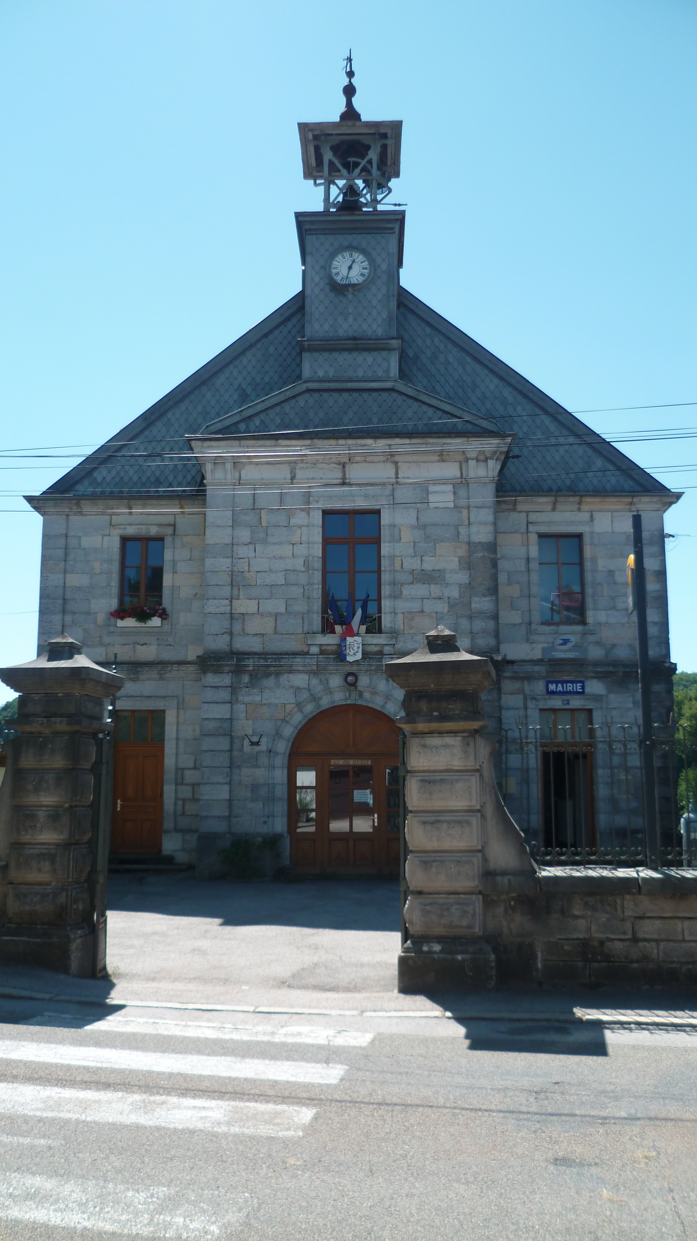 La mairie et la salle communale de la commune de Chaux-des-Crotenay, département du Jura, France.